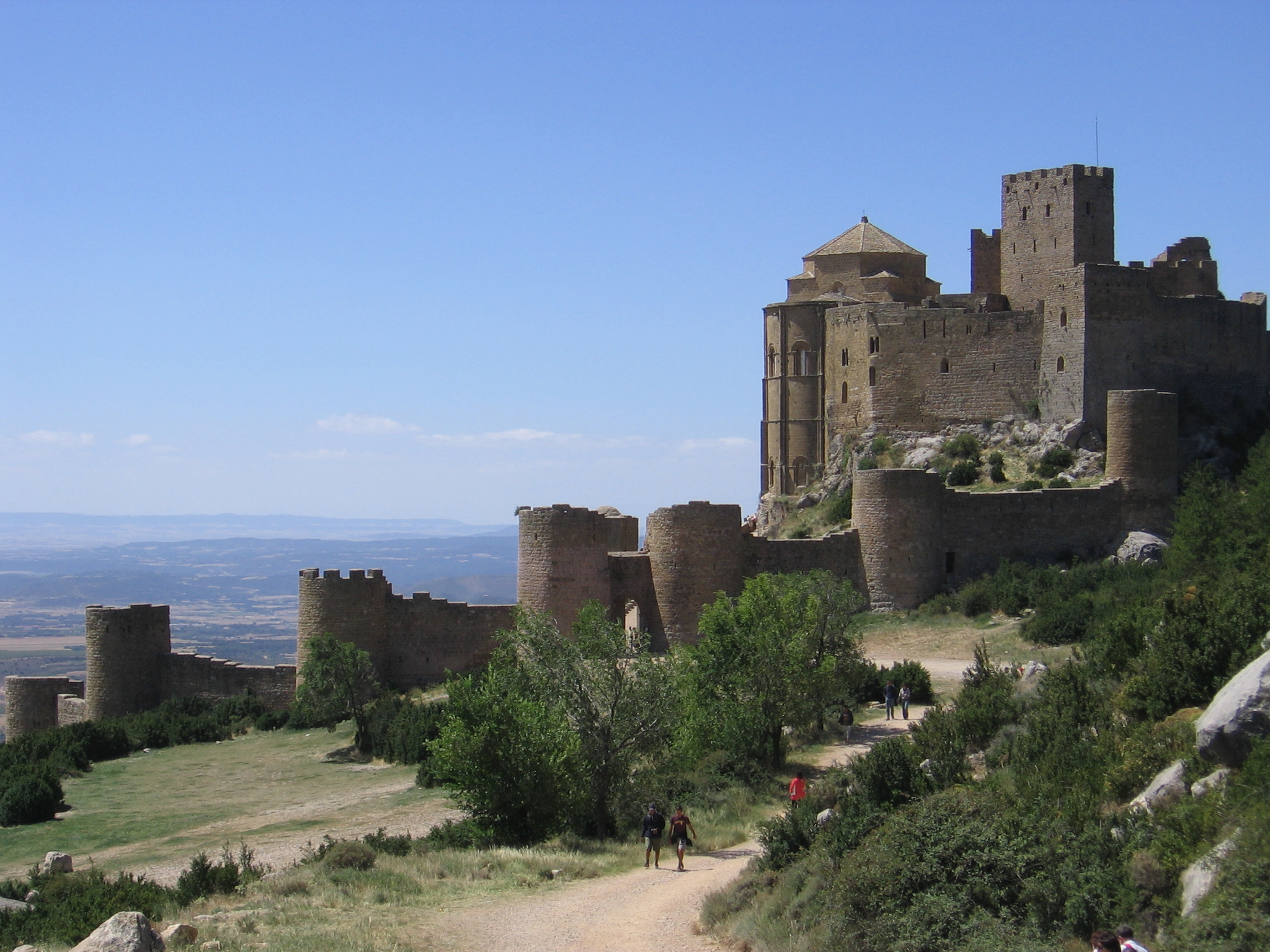 Vista del Castillo de Loarre. Este castillo románico, amurallado con torreones, está en la sierra de Loarre, en la provincia de Huesca (España) (a unos 35 kilómetros de la capital provincial). Fue construido en el siglo XI por orden del rey Sancho III de Navarra sobre un promontorio de roca caliza. Está considerado como la fortaleza románica mejor conservada de Europa.